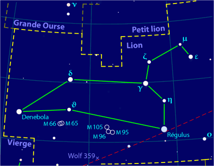 Carte pour la constellation Lion Produite à l'aide du logiciel PP3